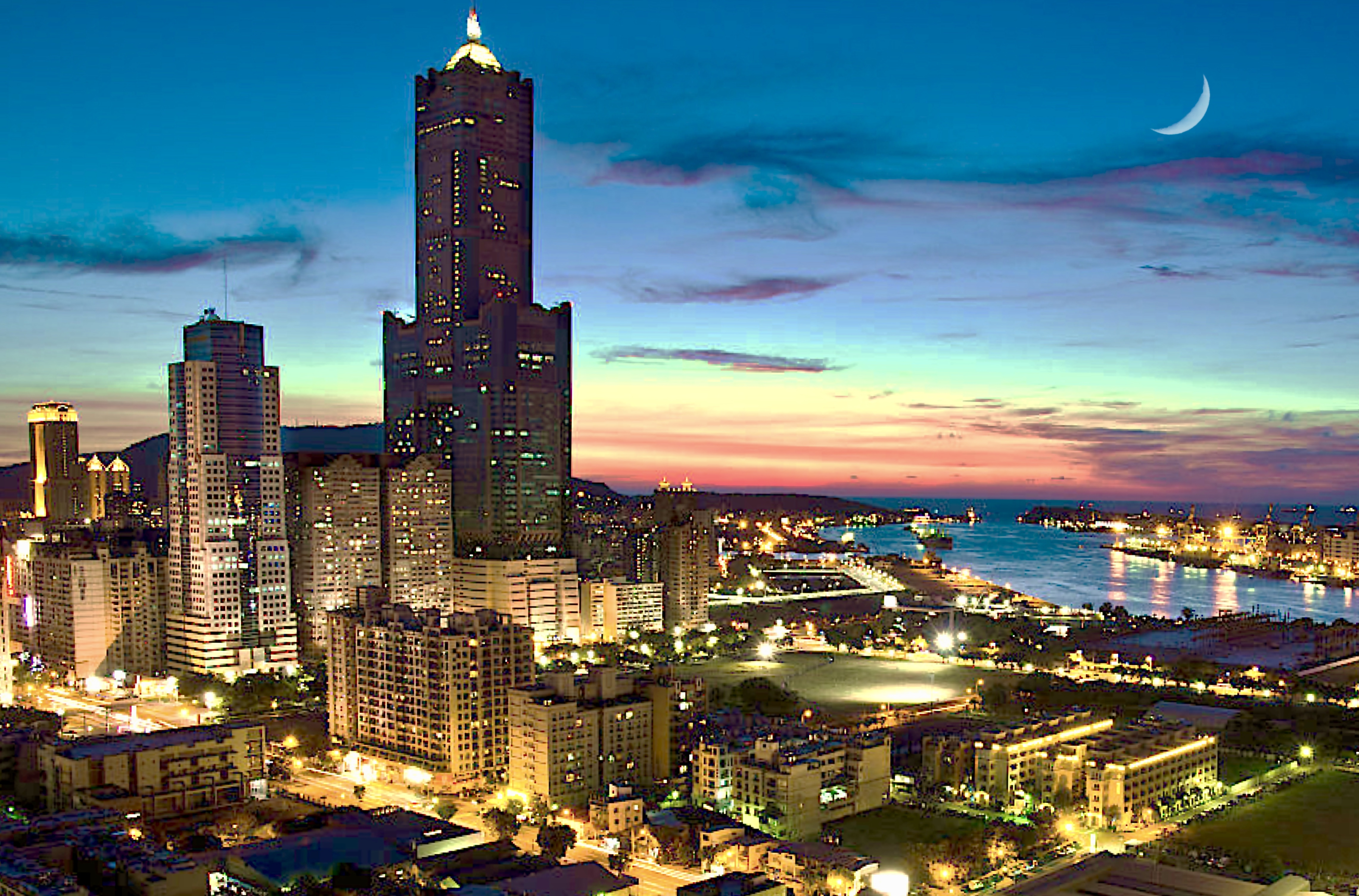 Skyline of city centre and CBD of downtown Kaohsiung, Taiwan - featuring the 85 Sky Tower and Kaohsiung Harbour